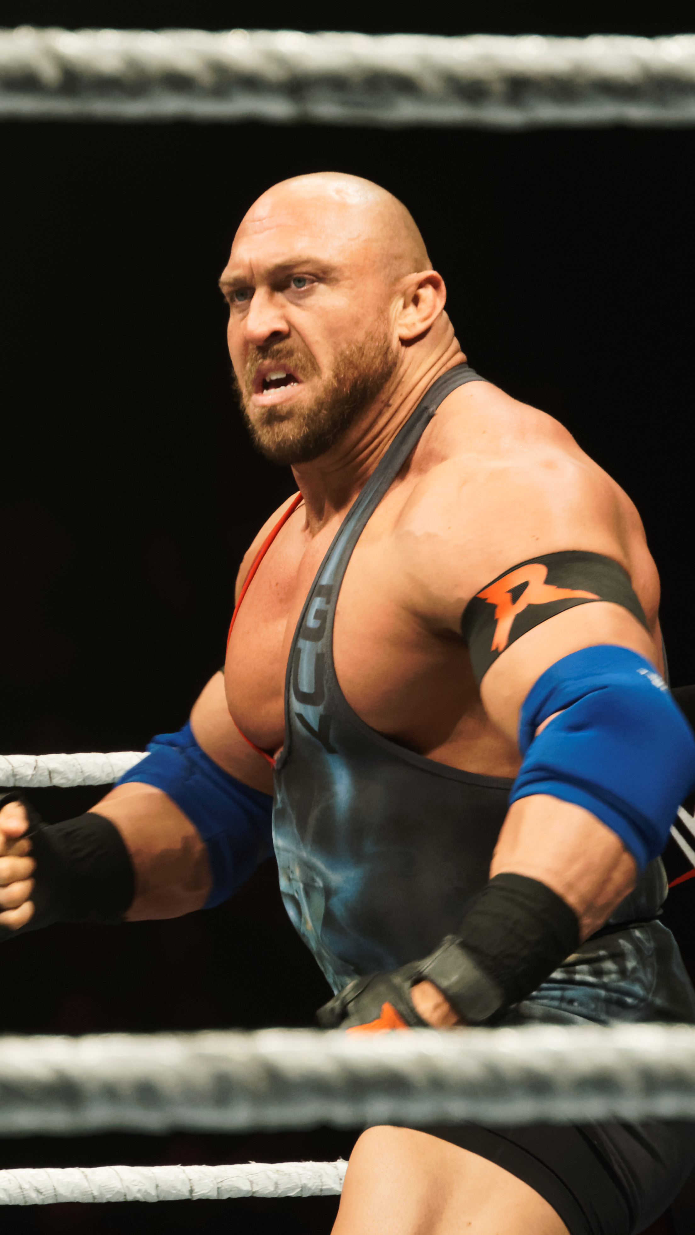 WWE Live@Lotto Arena - Antwerpen